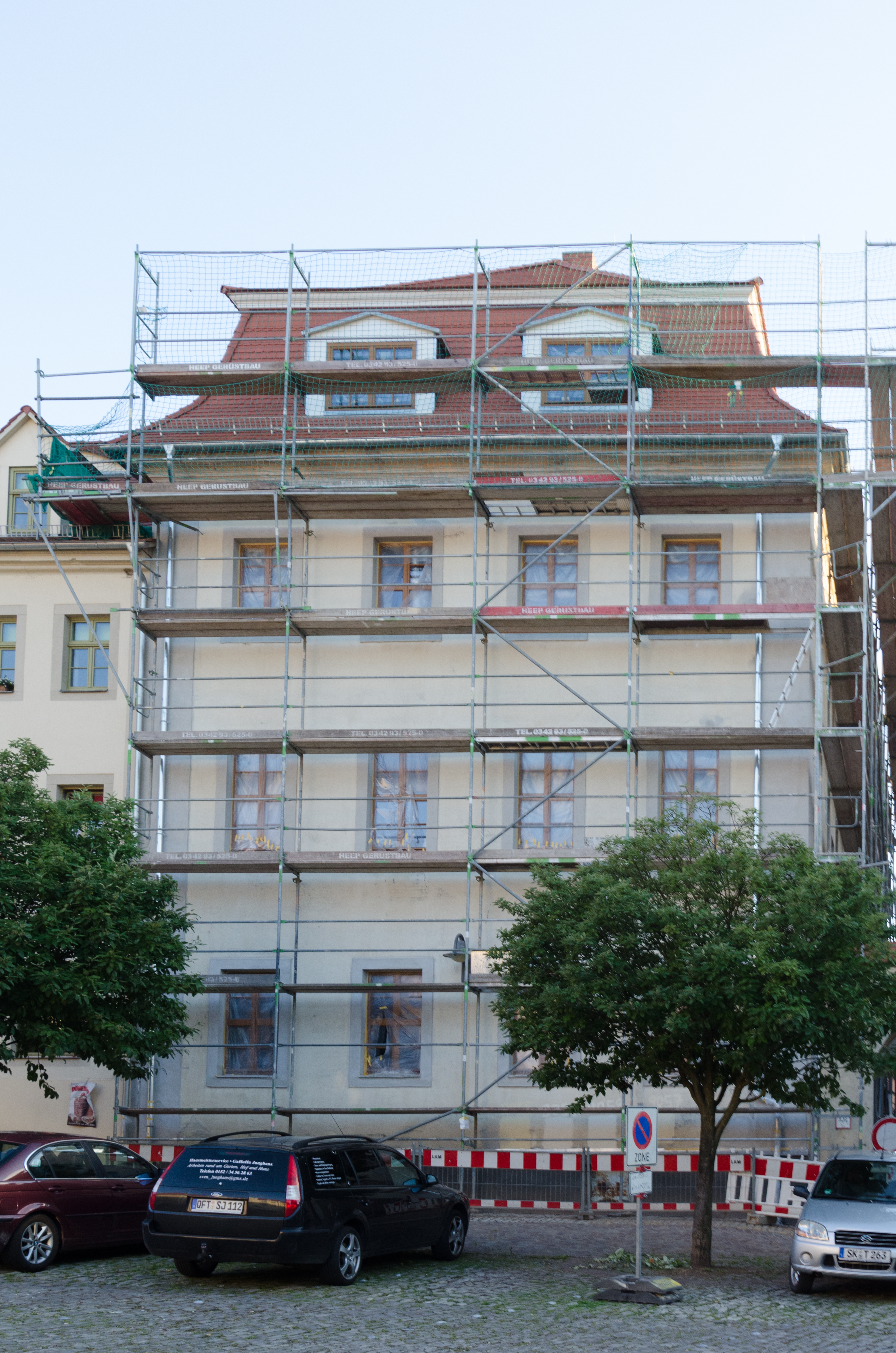 Querfurt, Markt 6